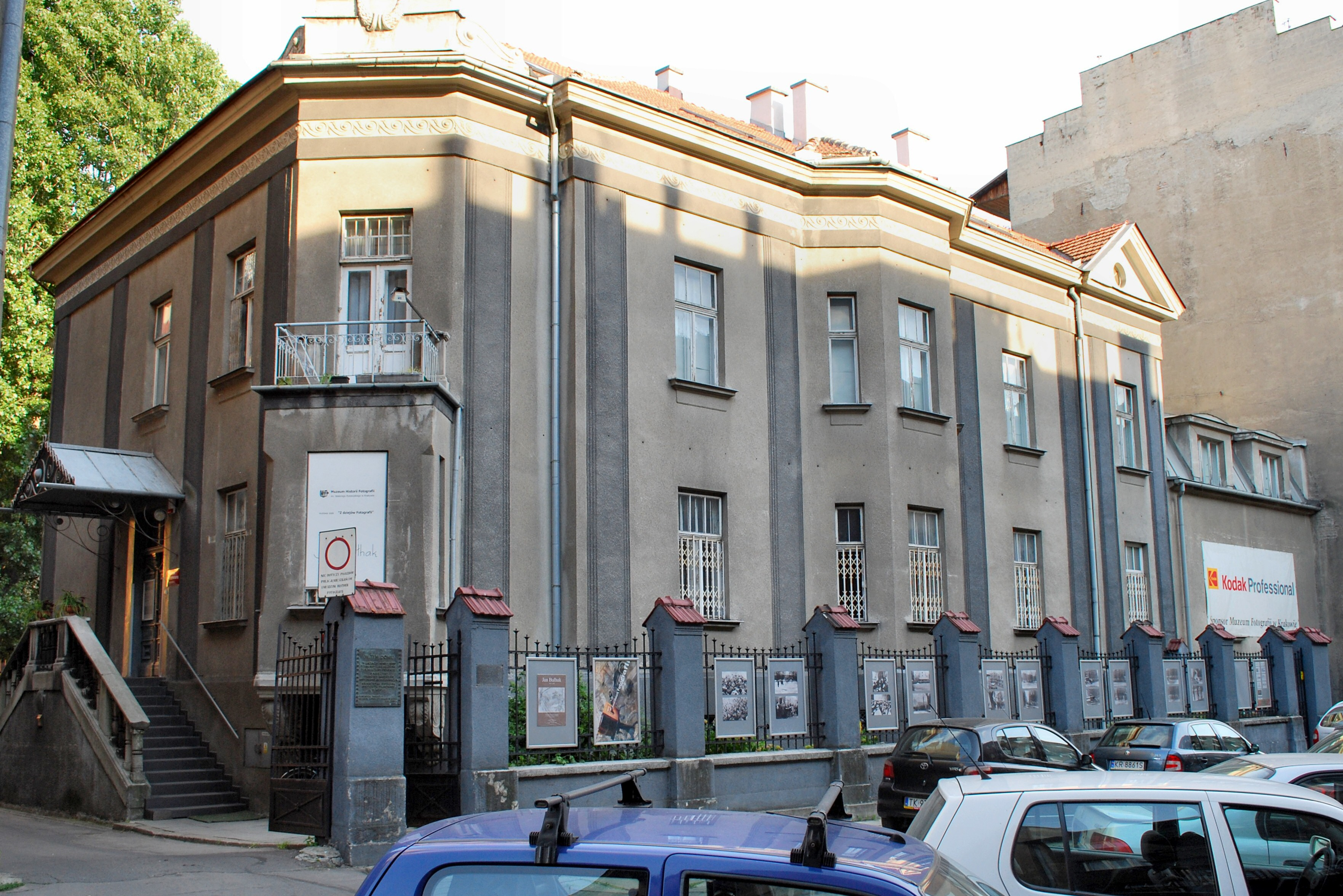 Budynek Muzeum Historii Fotografii